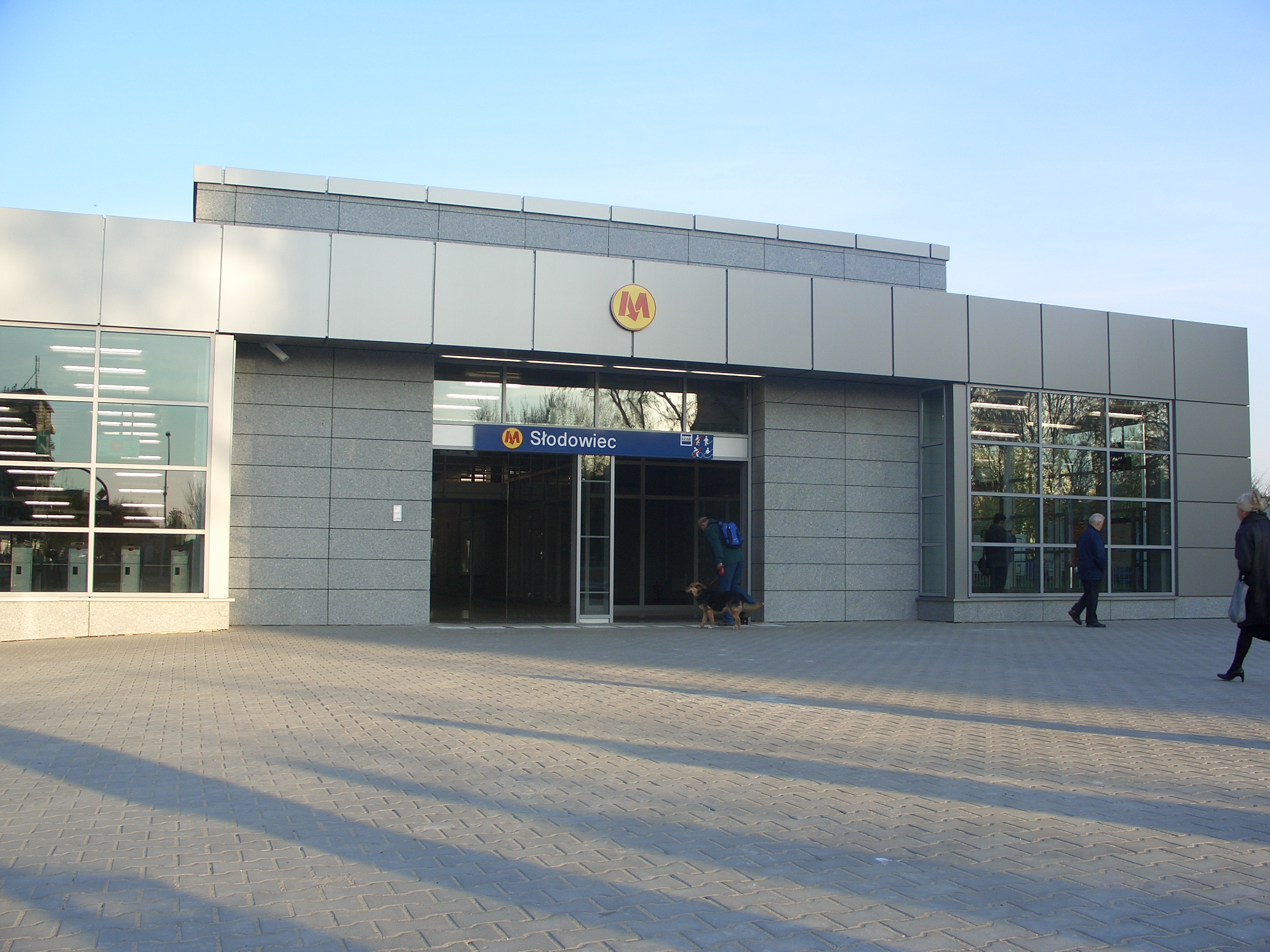 Wejście do stacji metra warszawskiego A-20 Słodowiec/Entrance to the Warsaw Metro station 'Słodowiec'